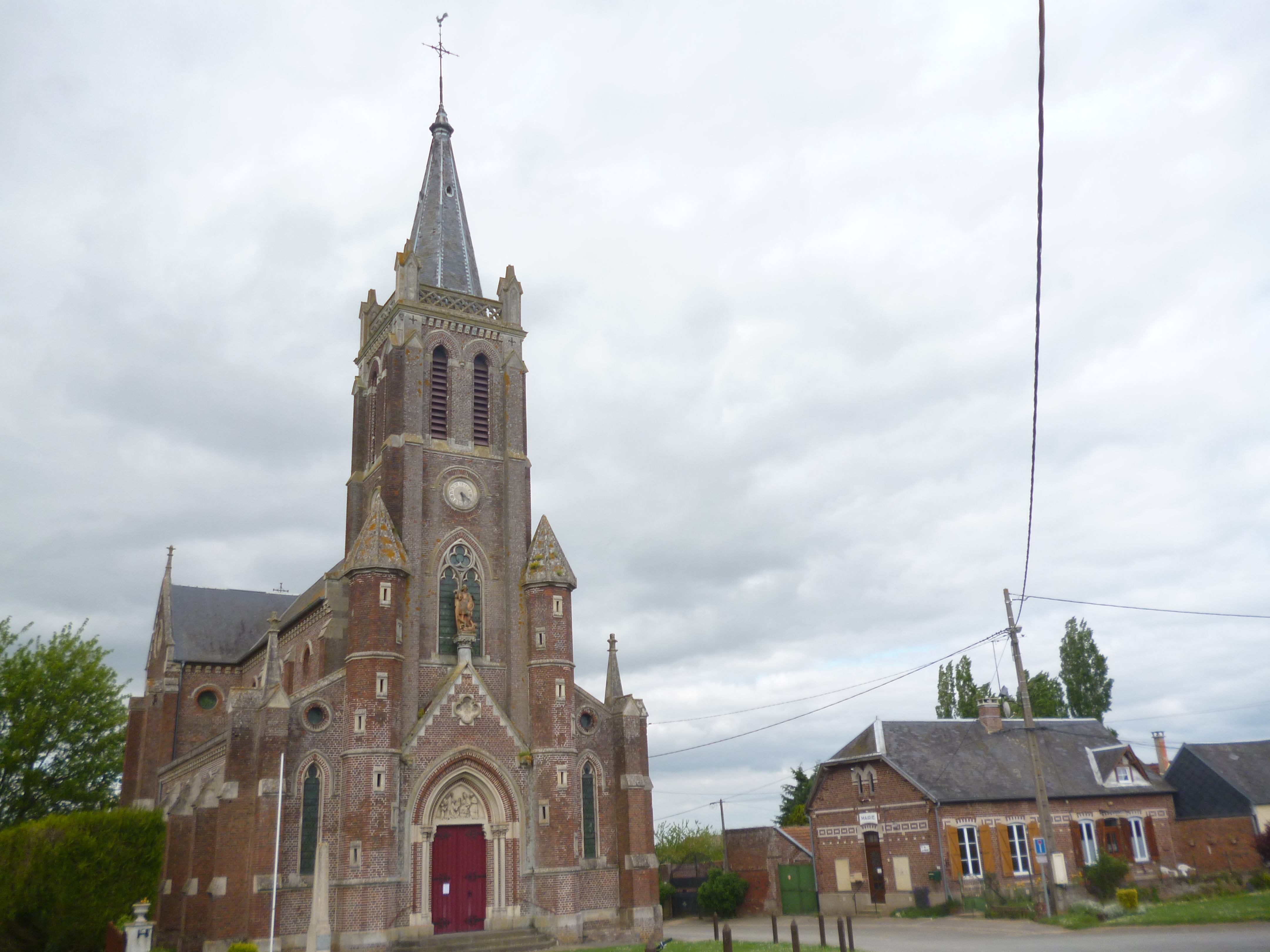 Eglise Saint-Victor, monument aux morts et mairie de la commune de Plainville (Oise).